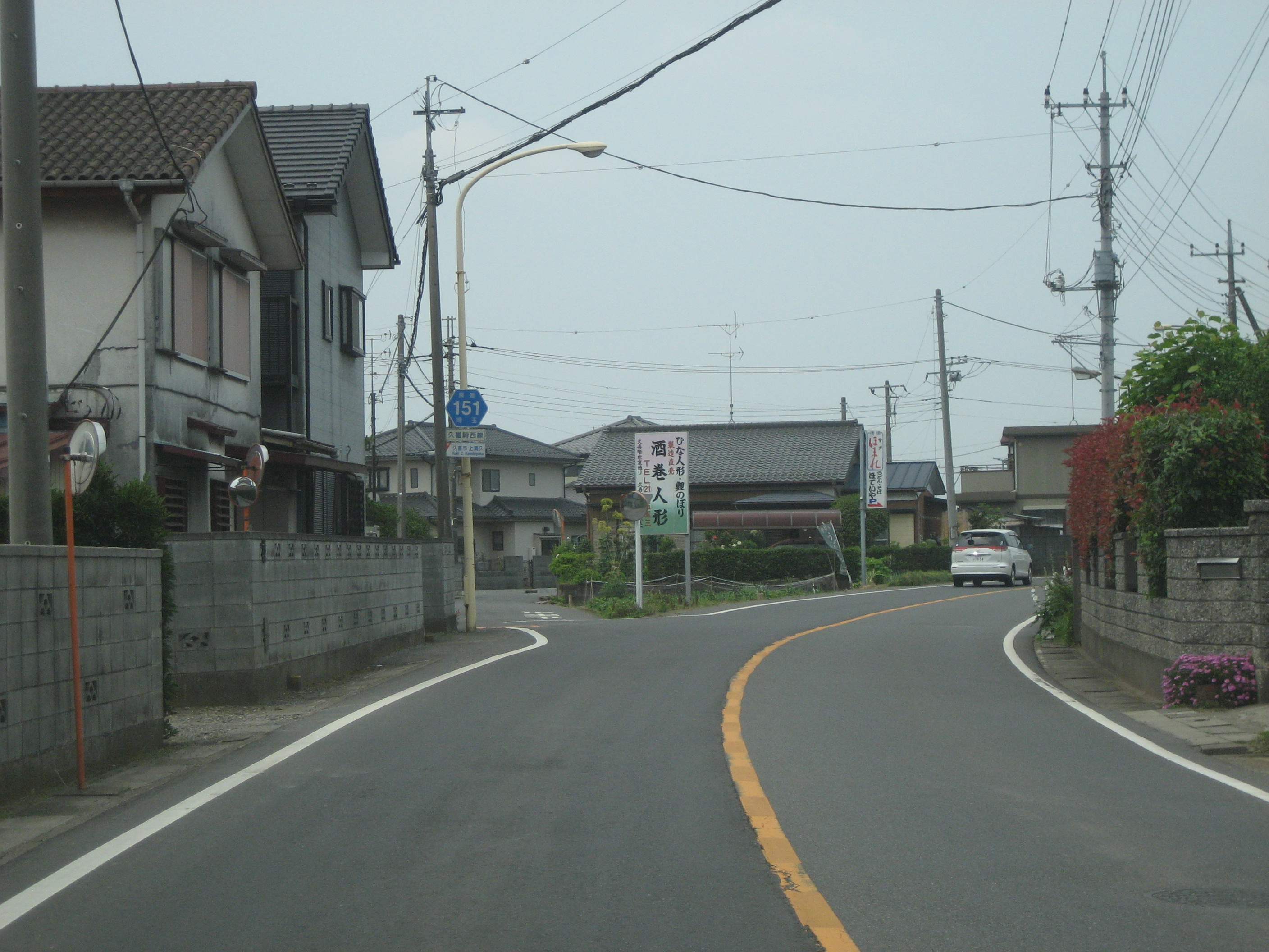 埼玉県道151号線久喜市内